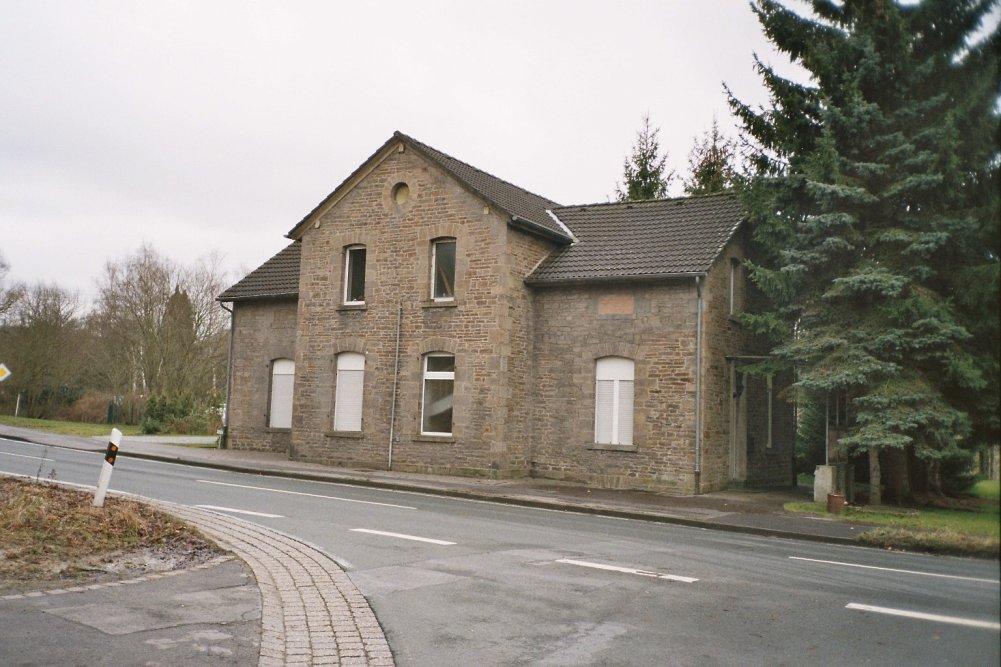 Vielleicht ältestes erhaltenes Bahnhofsbauwerk Deutschlands an der Strecke der Prinz-Wilhelm-Eisenbahn-Gesellschaft (gegründet schon 1828 als "Deilthaler Eisenbahngesellschaft"), zwischen Neviges und Wuppertal-Vohwinkel an der ehemaligen Spitzkehre, genannt "Kopfstation".